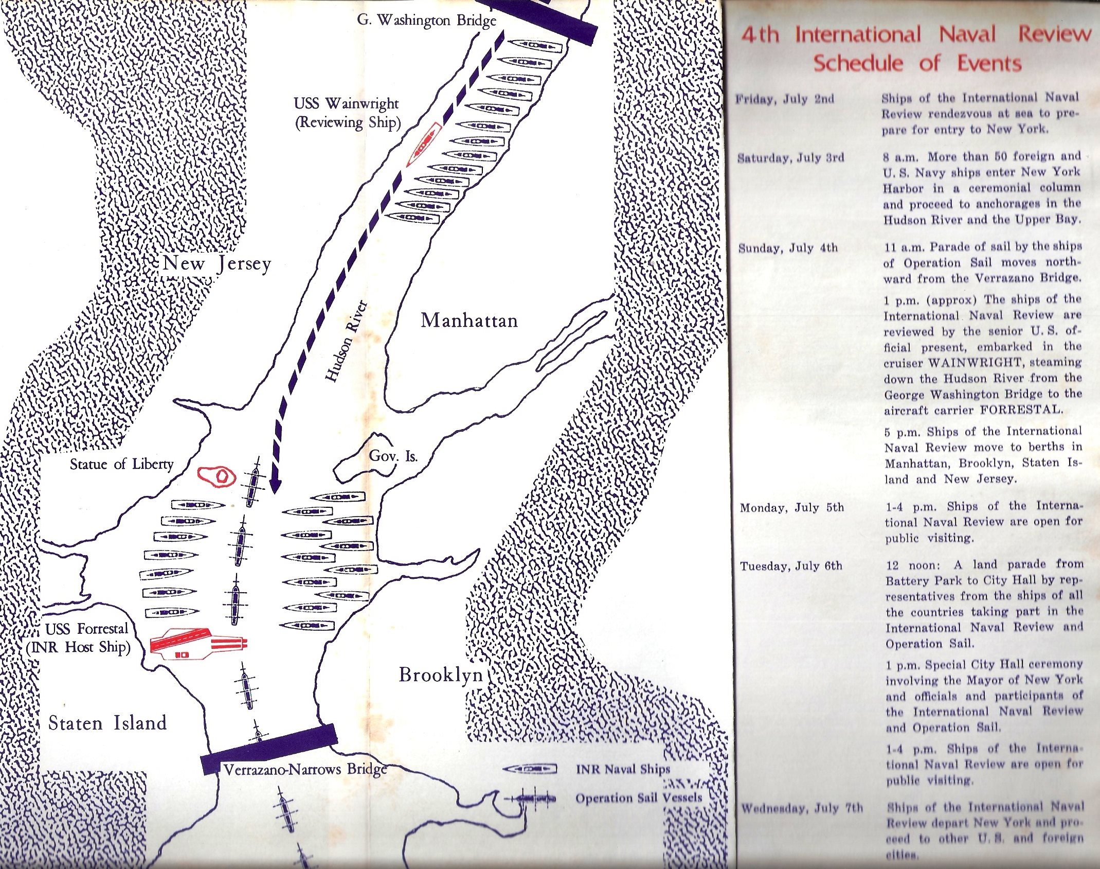 תכנית העגינה בנמל ניו יורק ומהלך הטקסים בחגיגות 200 שנה לארצות הברית